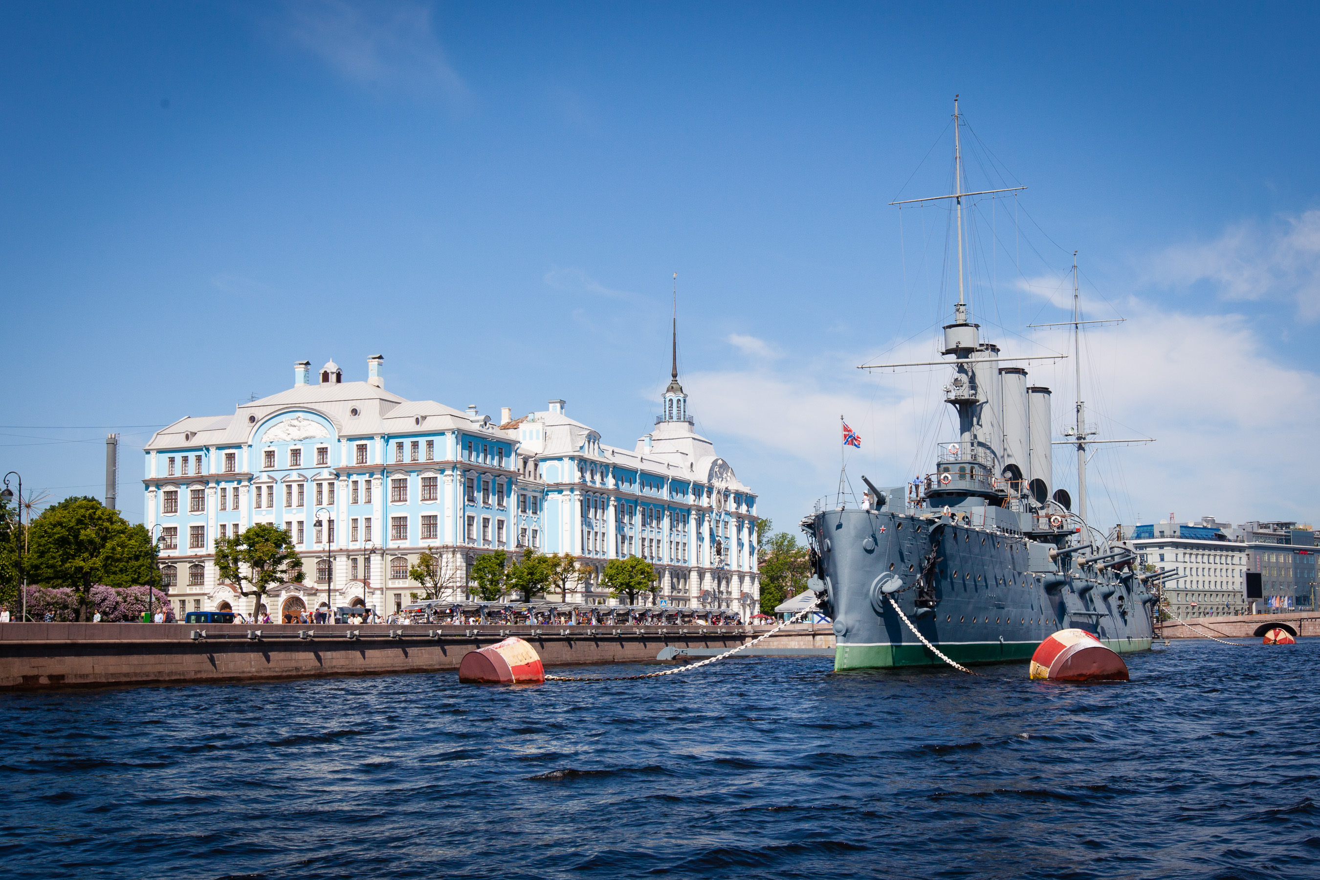 St. Petersburg